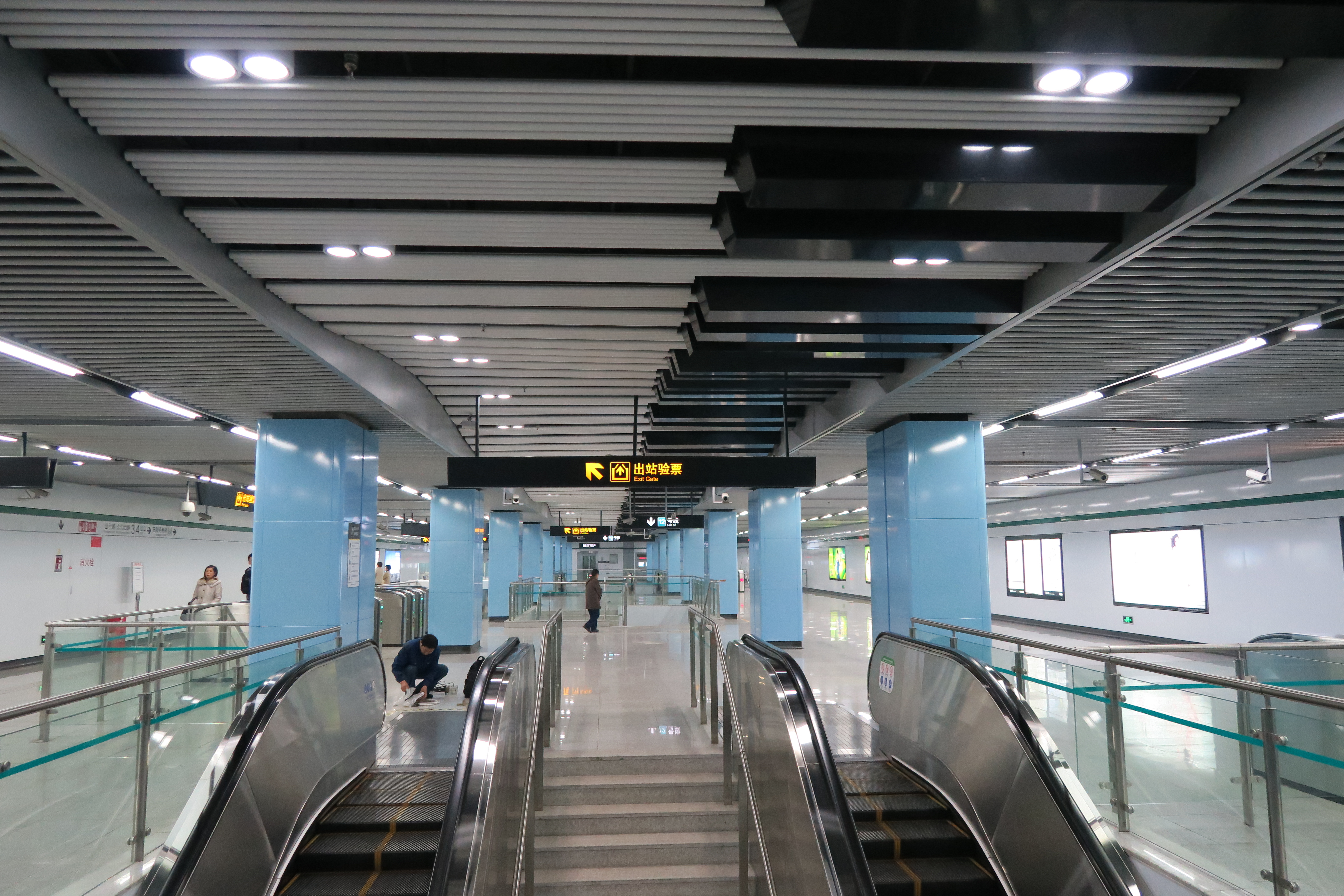 12号线提篮桥站